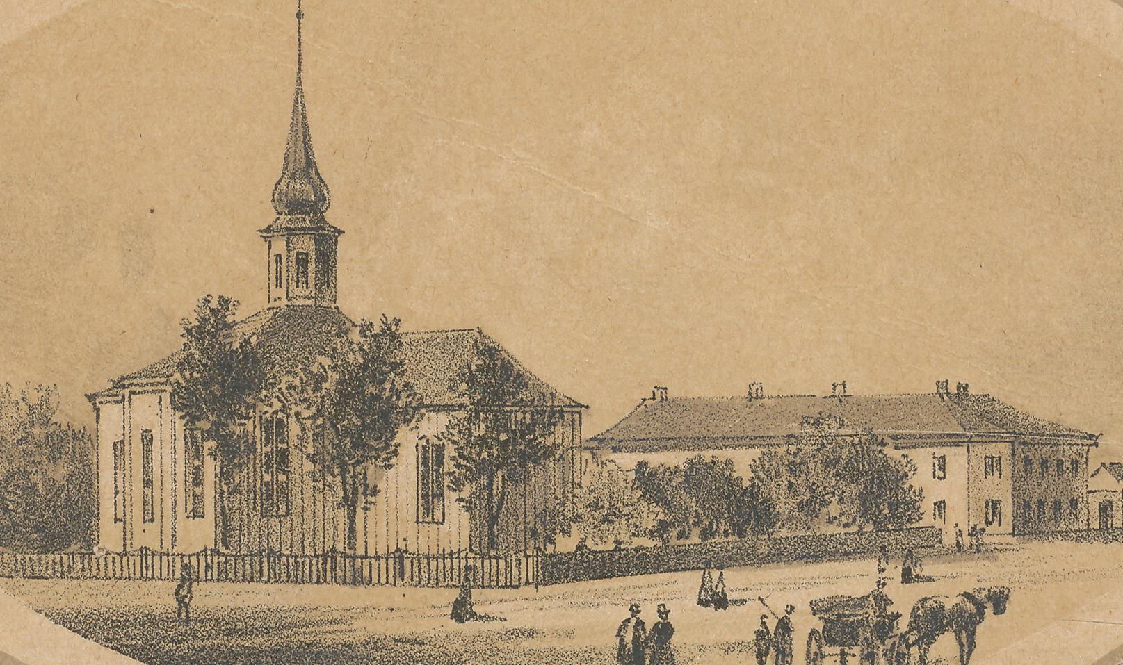 Hospitalskirken i Trondheim, bygget i 1705 av arkitekt Johan Christopher Hempel (d. 1729) som muligens kom fra Nederland. Ombygging av sakristi utført 1929 av arkitekt Kirsten Wleügel. I forbindelse med Hospitalets 800-årsjubileum ble det 1977 utført rehabilitering med endring av våpenhus og orgelgalleri, full utvendig og innvendig oppussing / maling med originale farver hentet frem av Riksantikvaren; arbeid utført under arkitekt Jarle Øyasæter. Ukjent tegner og ukjent år.